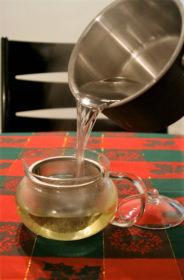 Zubereitung von Tee: Aufgießen von Teeblättern in einer hitzebeständigen Glaskanne mit kochendem bzw. bis kurz vorm Siedepunkt erhitzten Wasser.